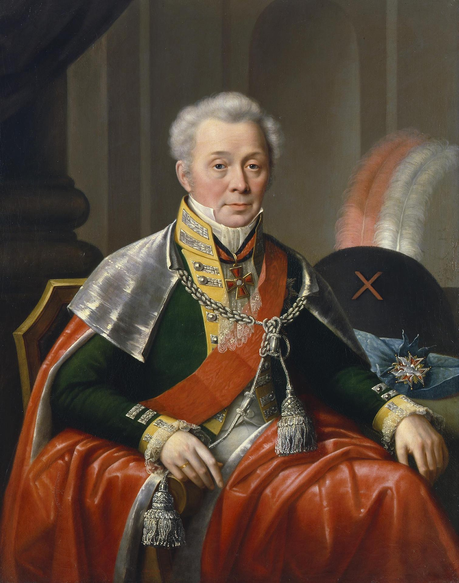 Петр Васильевич Мятлев (1756-1833), сын адмирала В.А.Мятлева и П.Я.Дашковой; сенатор, директор Ассигнационного банка.